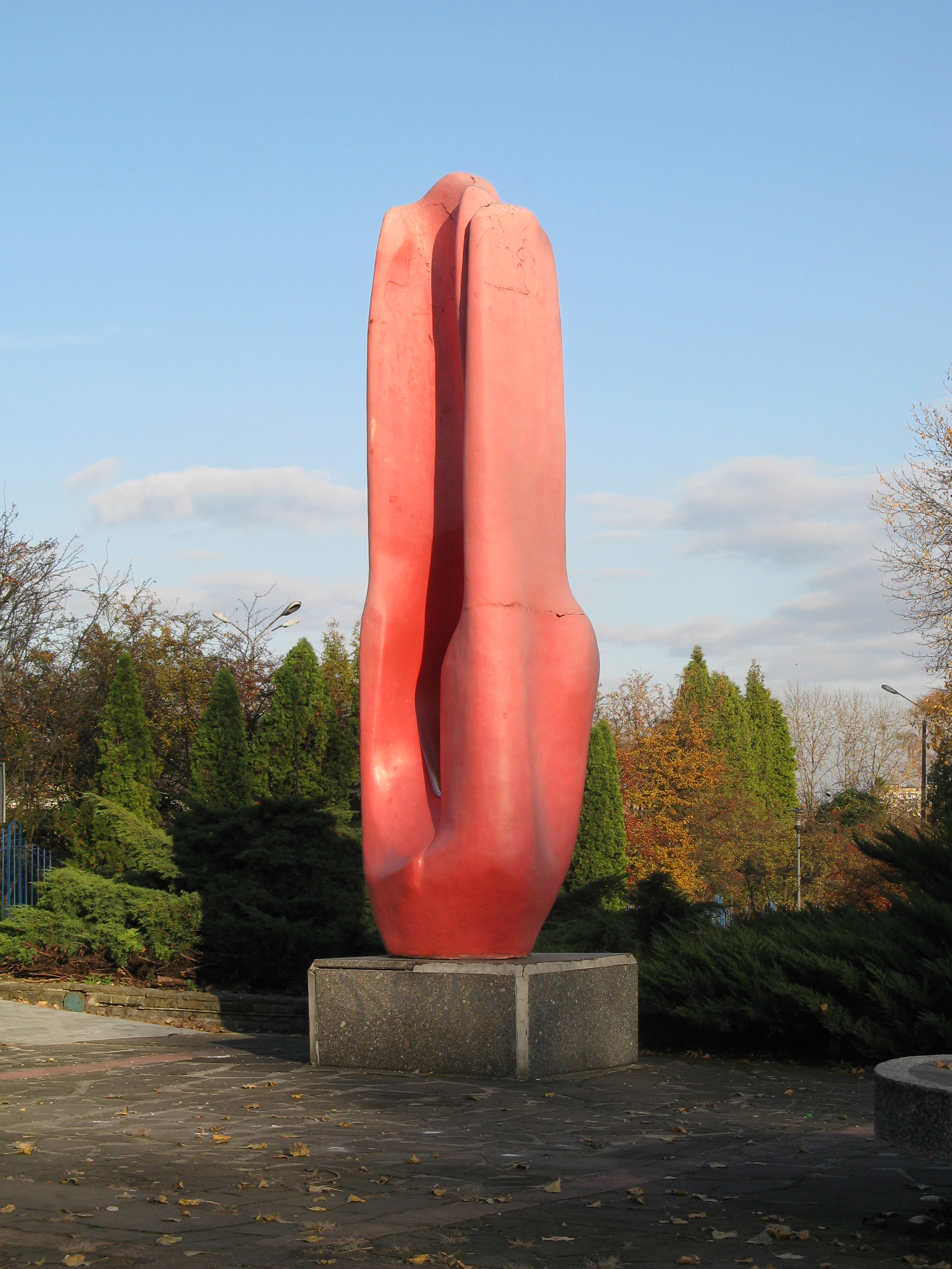 Rzeźba plenerowa „Rozkwitanie” (pot. „marchewa”, „kwiat lotosu”) przy wejściu na teren Ośrodka Sportu i Rekreacji Skałka w Świętochłowicach autorstwa Gerarda Grzywaczyka.